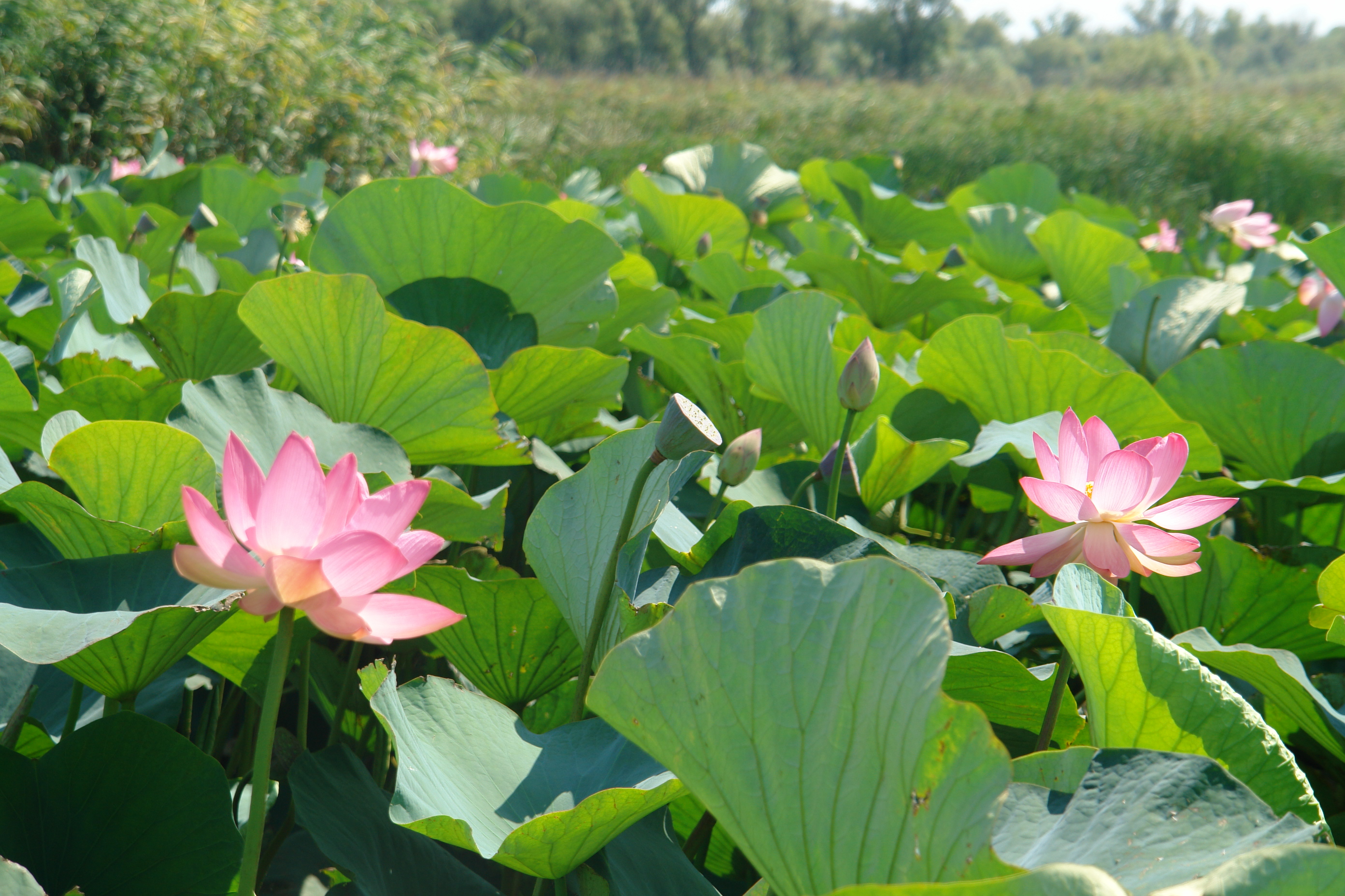 Лотосы в Долине лотосов (Краснодарский край)